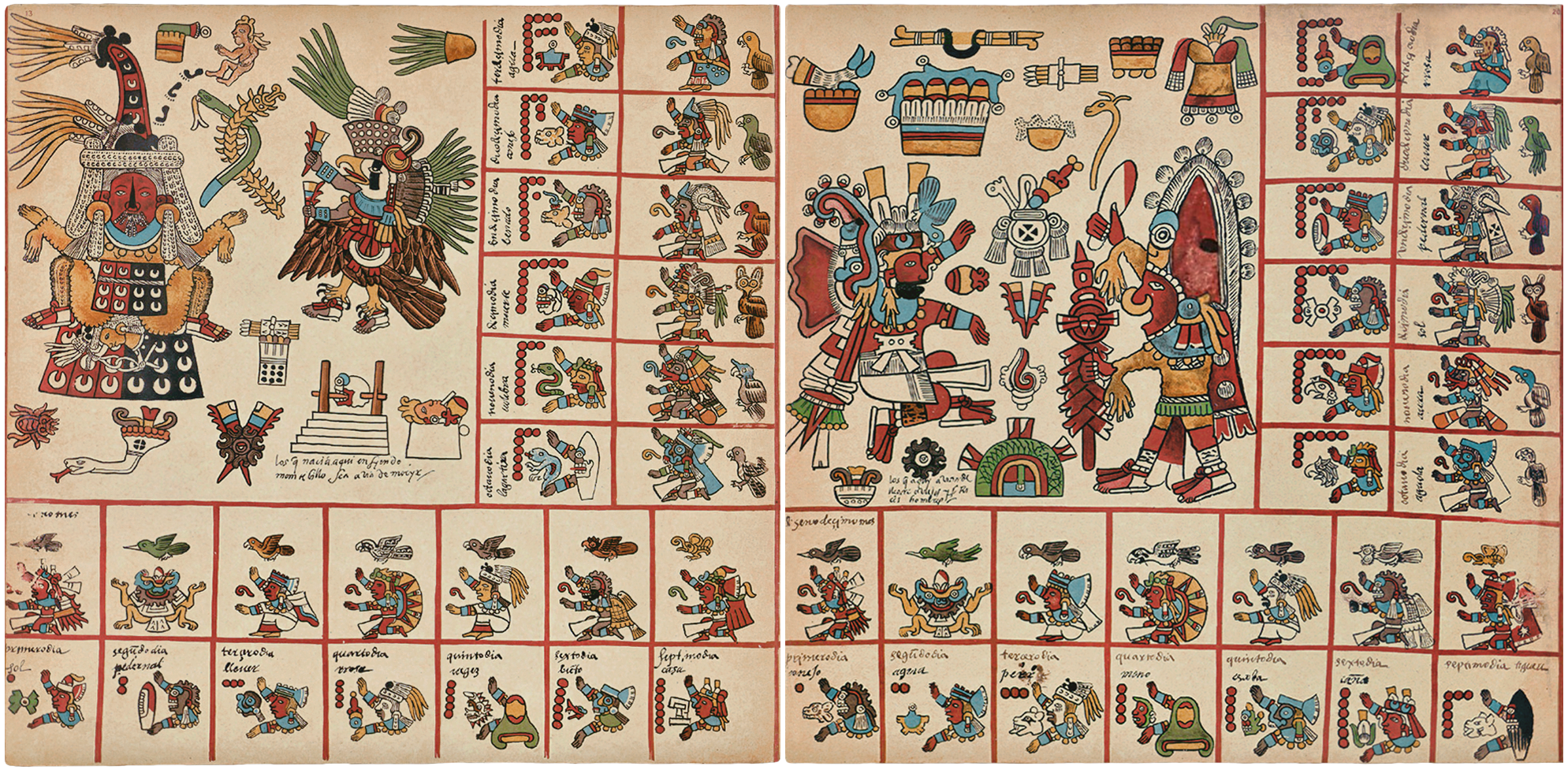 Planches 13 et 20 du codex Borbonicus. Étalonnage des couleurs en correspondance avec l'oeuvre originale.